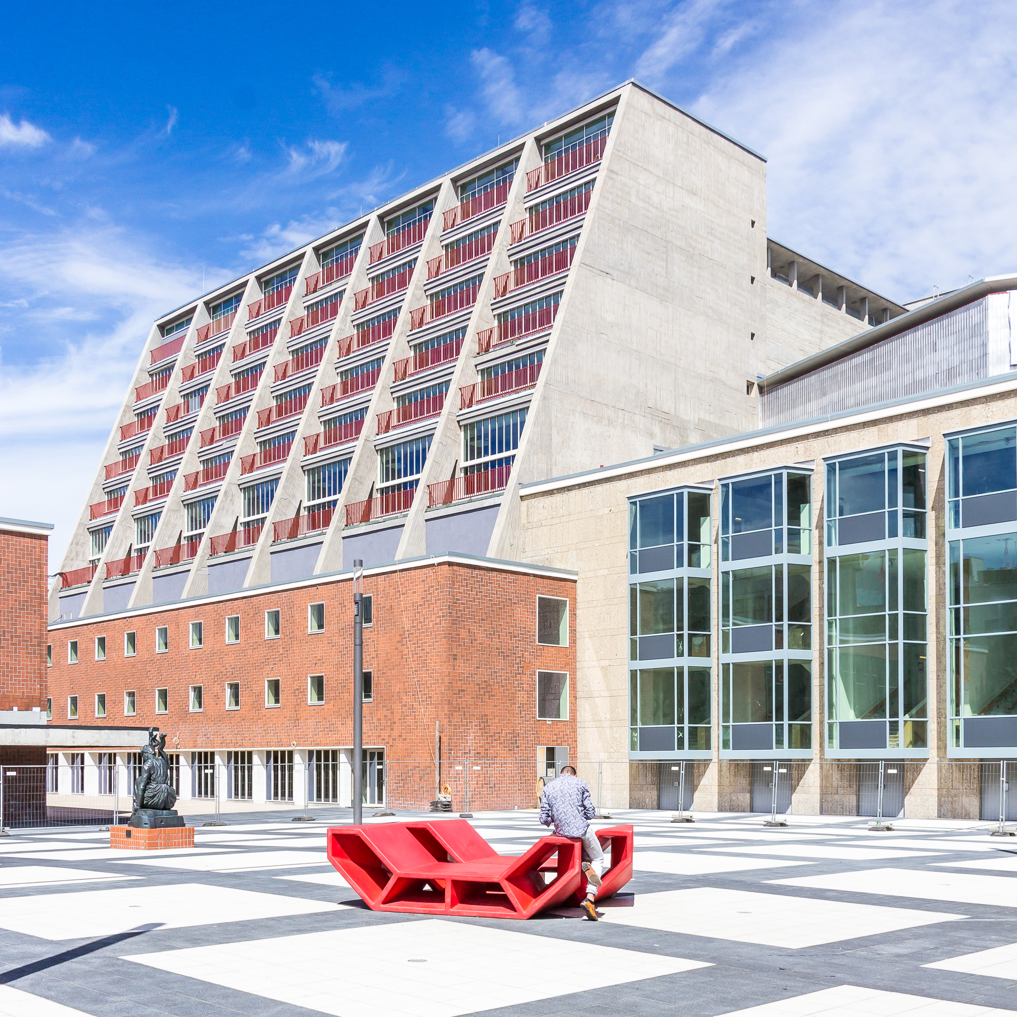 Oper Köln, Ansicht Kleiner Offenbachplatz. Die Außensanierung ist weitestgehend fertiggestellt, die originale Betonsichtigkeit der Werkstatttürme wiederhergestellt. Innen ruht die Sanierung seit längerem